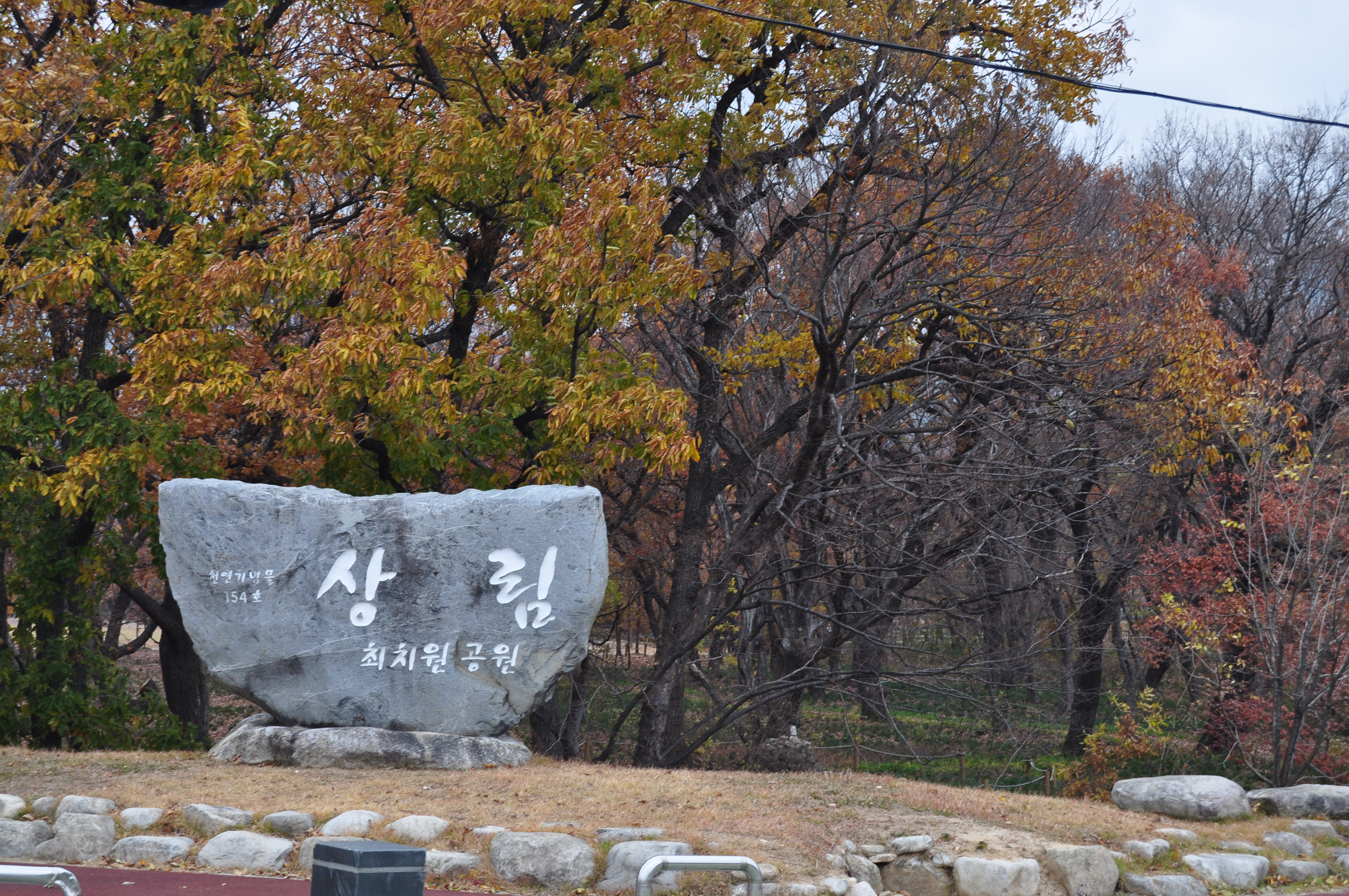 대한민국 천연기념물 제154호 함양상림(咸陽上林)